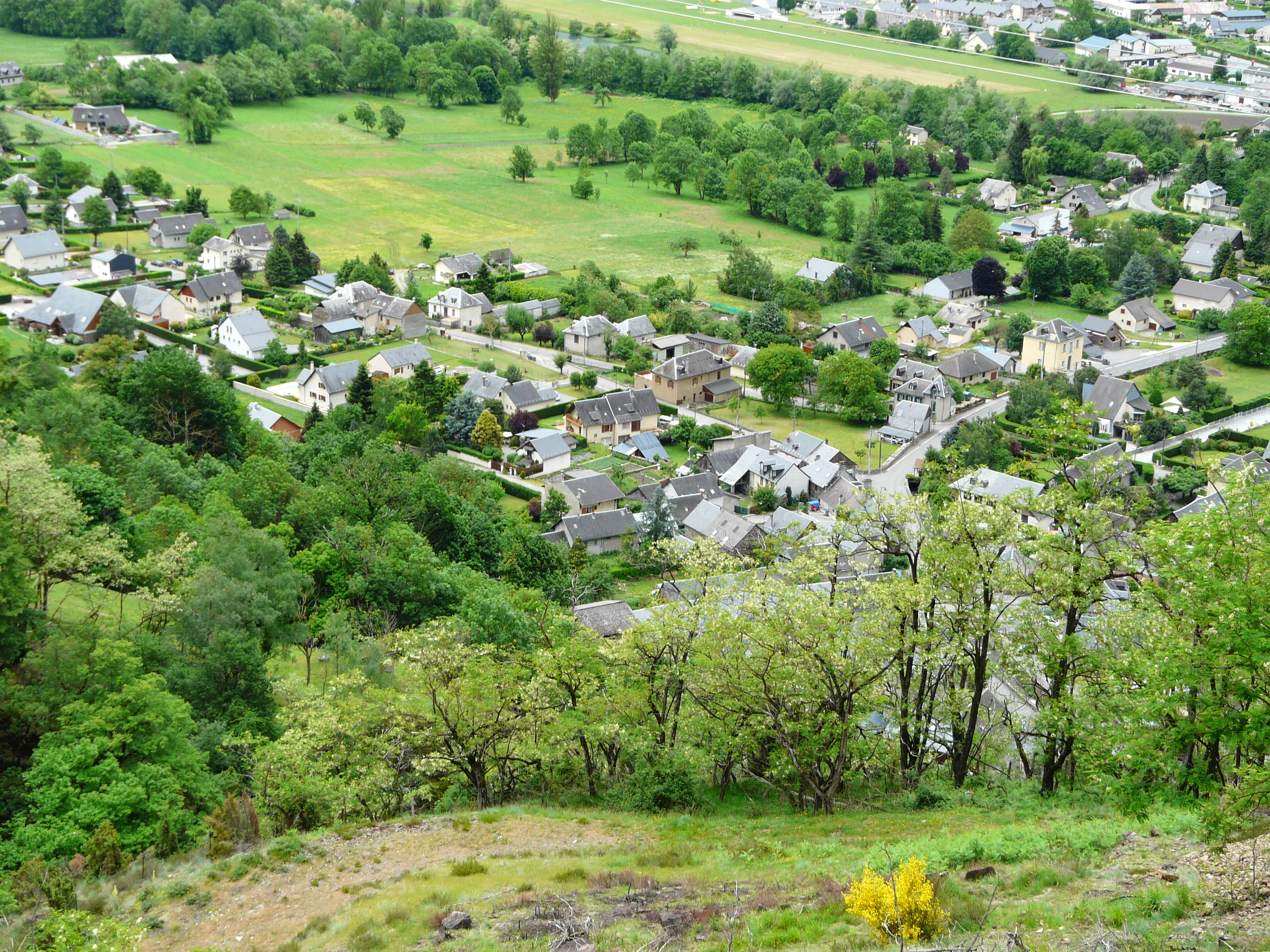 Le village de Juzet-de-Luchon vu du nord-est, Haute-Garonne, France.